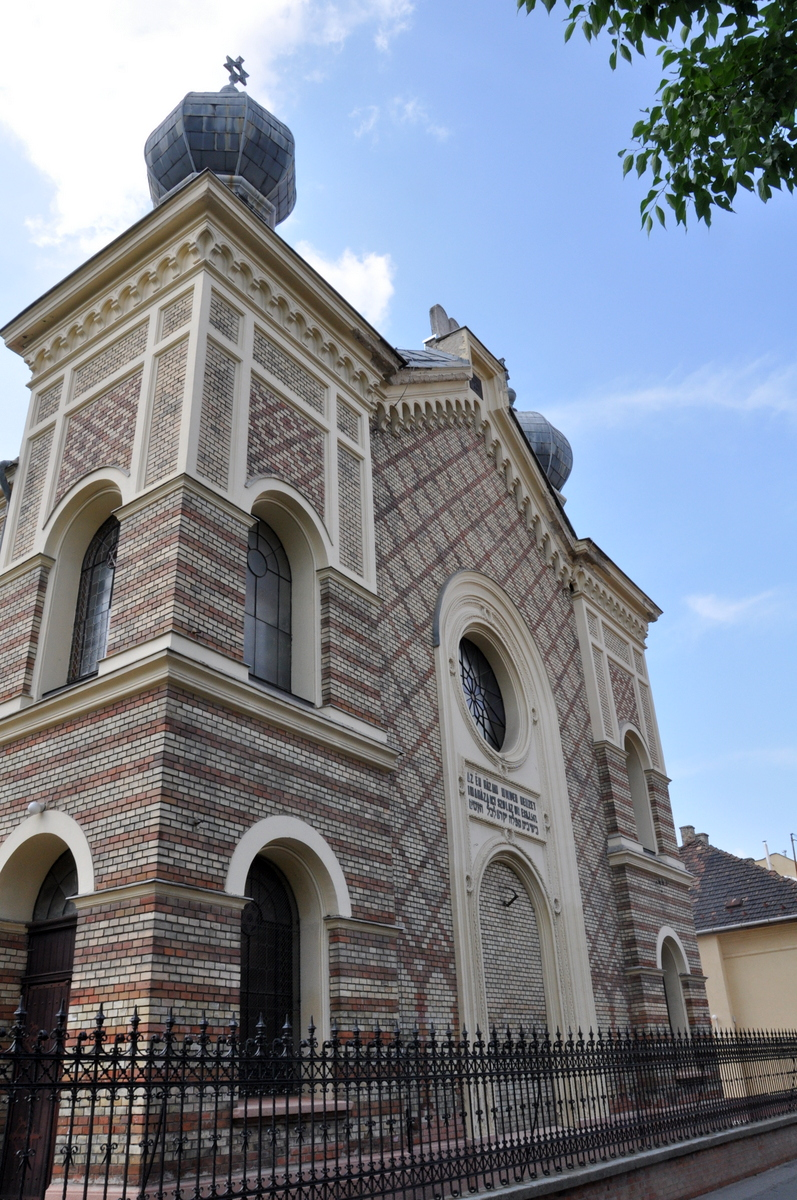 Újpest Synagogue, Budapest District IV